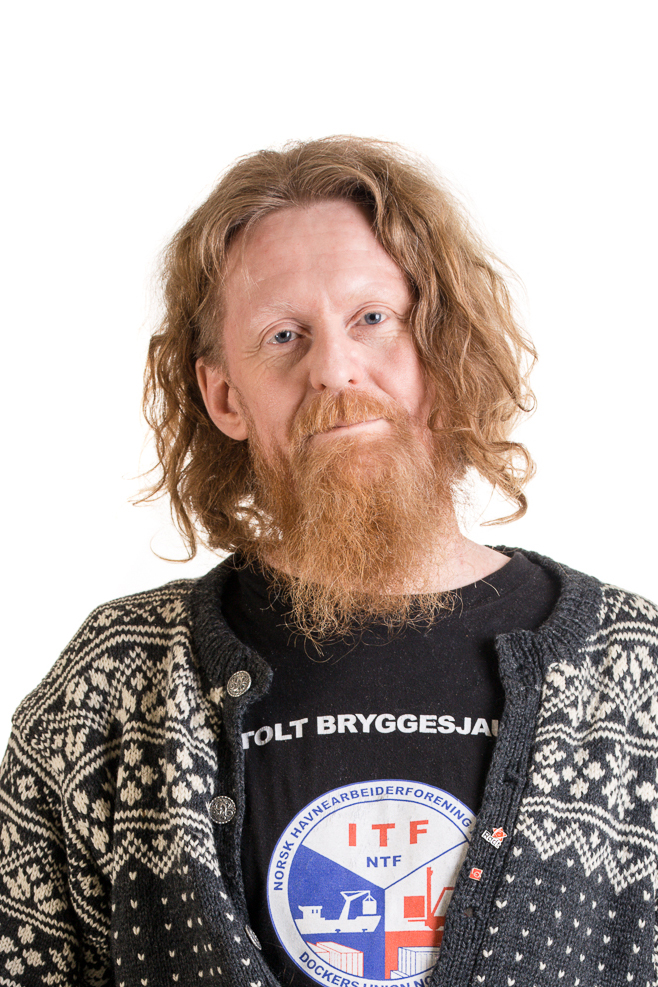 Bystyrerepresentant for Rødt Trondheim. Andrekandidat til Stortinget for Rødt Sør-Trøndelag.